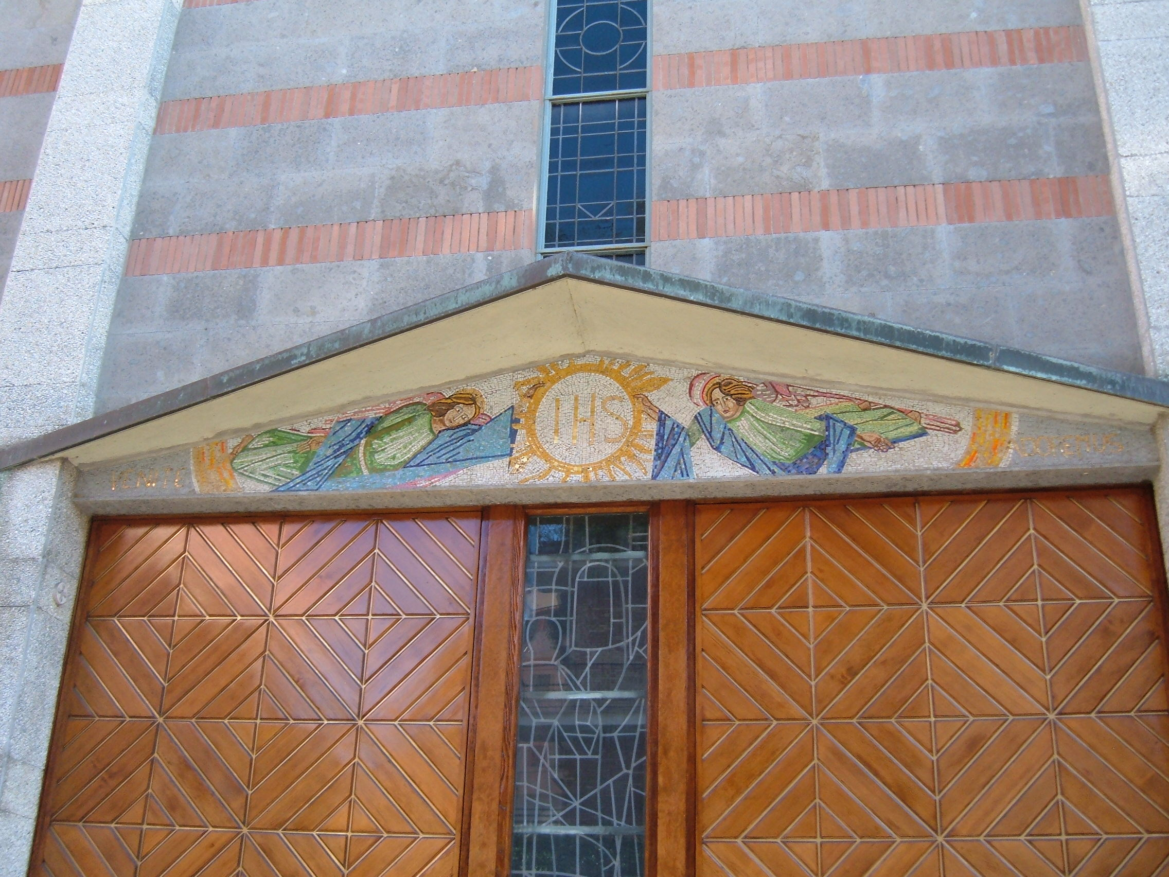 Cappella del Corpus Domini, a Roma, nel quartiere Ostiense, in via delle Sette Chiese. Chiesa annessa all'Istituto delle Suore Discepole di Gesù Eucaristico.